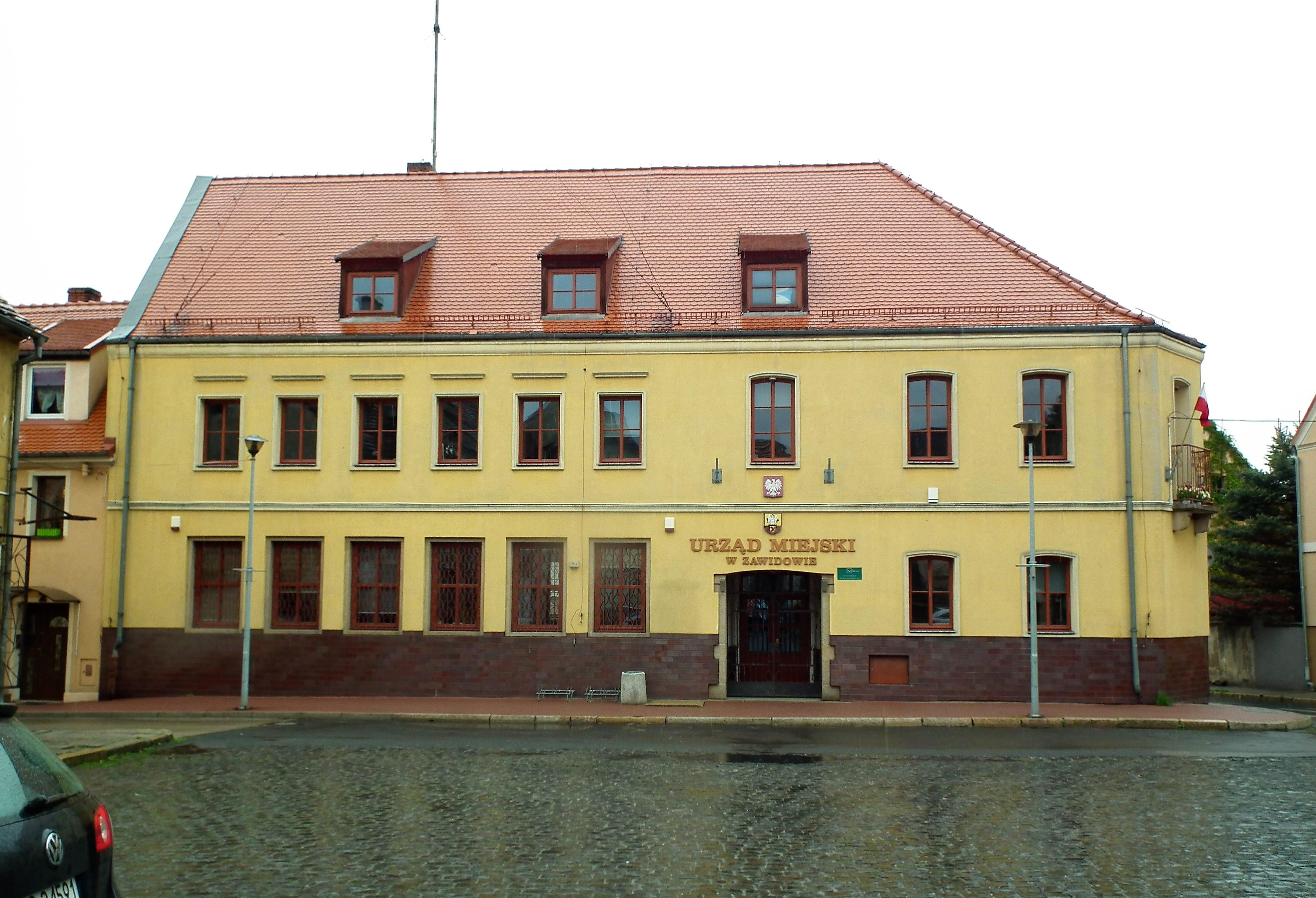 Ratusz w Zawidowie.